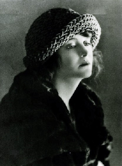 Mae Marsh